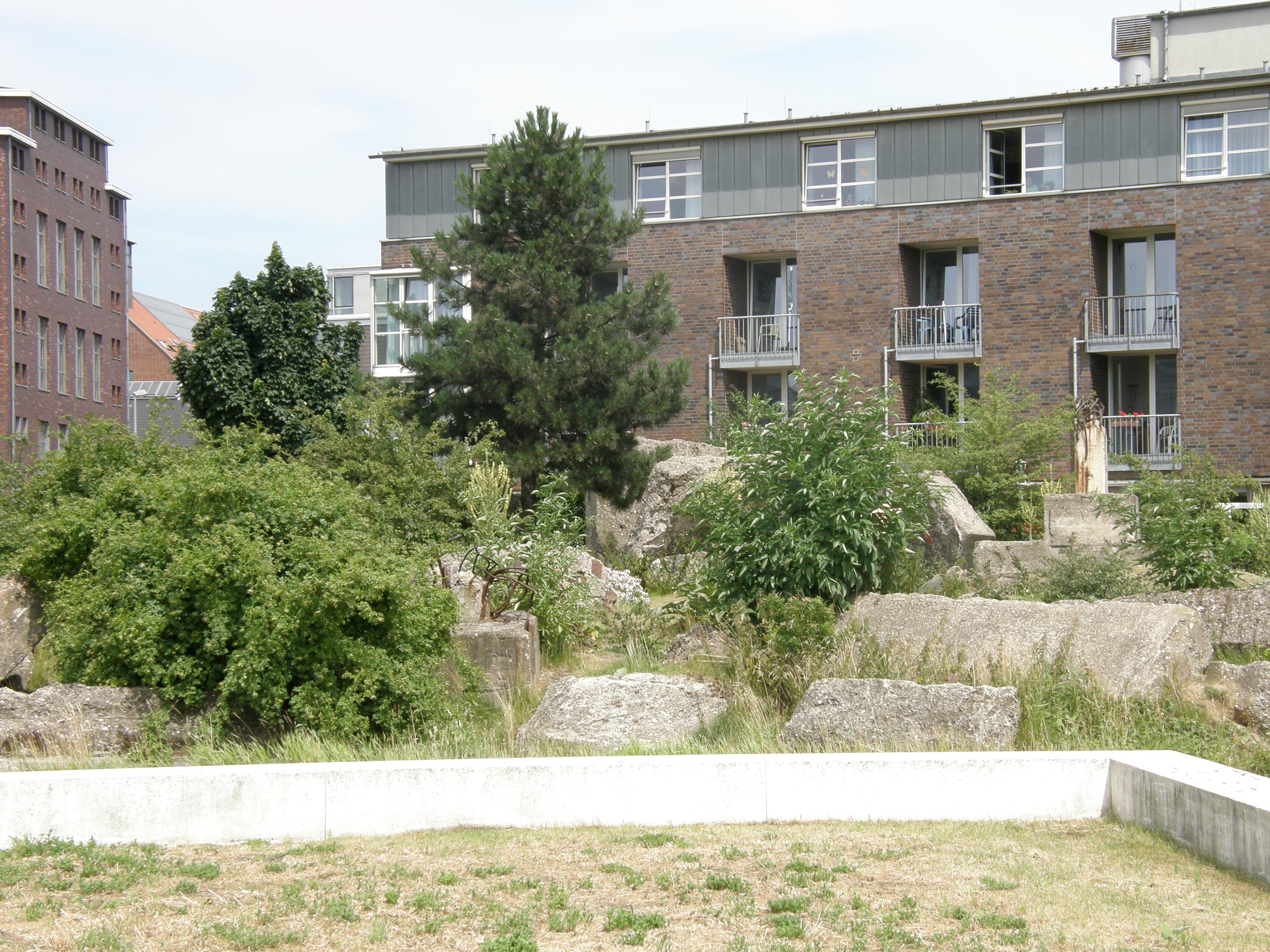 Innenhafen Duisburg: Seniorenzentrum der AWO vom Garten der Erinnerung aus fotografiert, im Vordergrund der Steingarten.